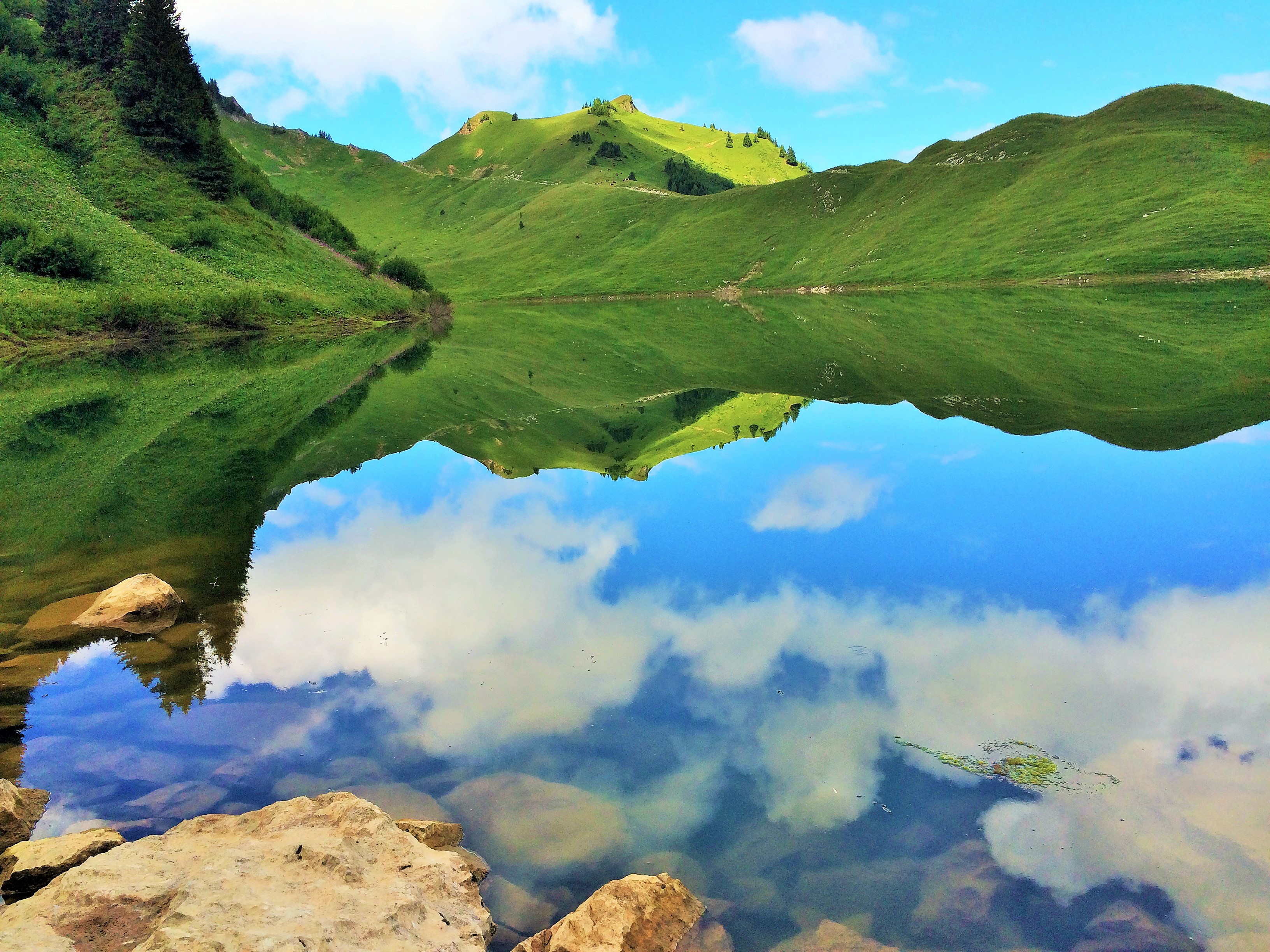 Le lac, à gauche le col de la "Forclaz", accés par le GR 96 (Carte IGN- 3430)